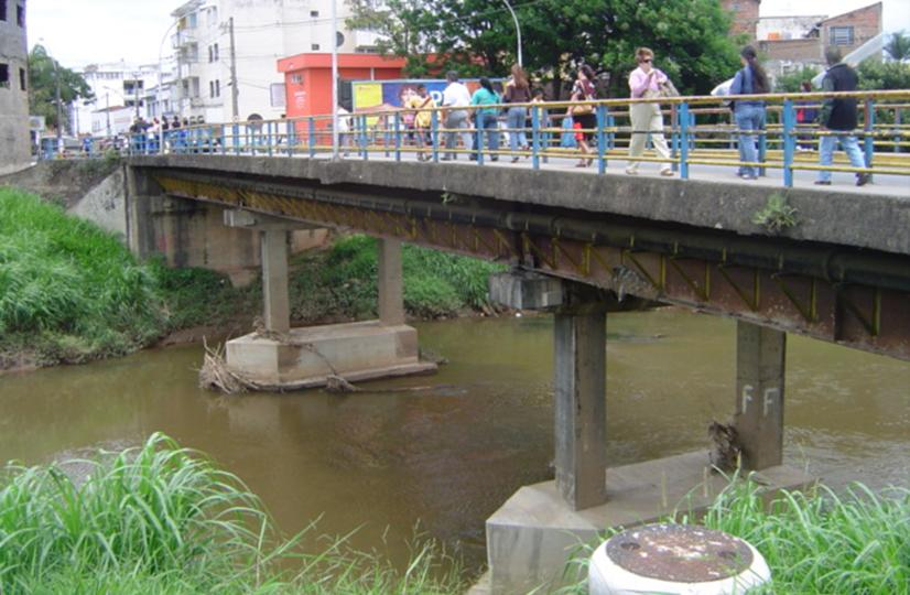 Ponte sobre o rio Sapucaí em Itajubá, Minas Gerais